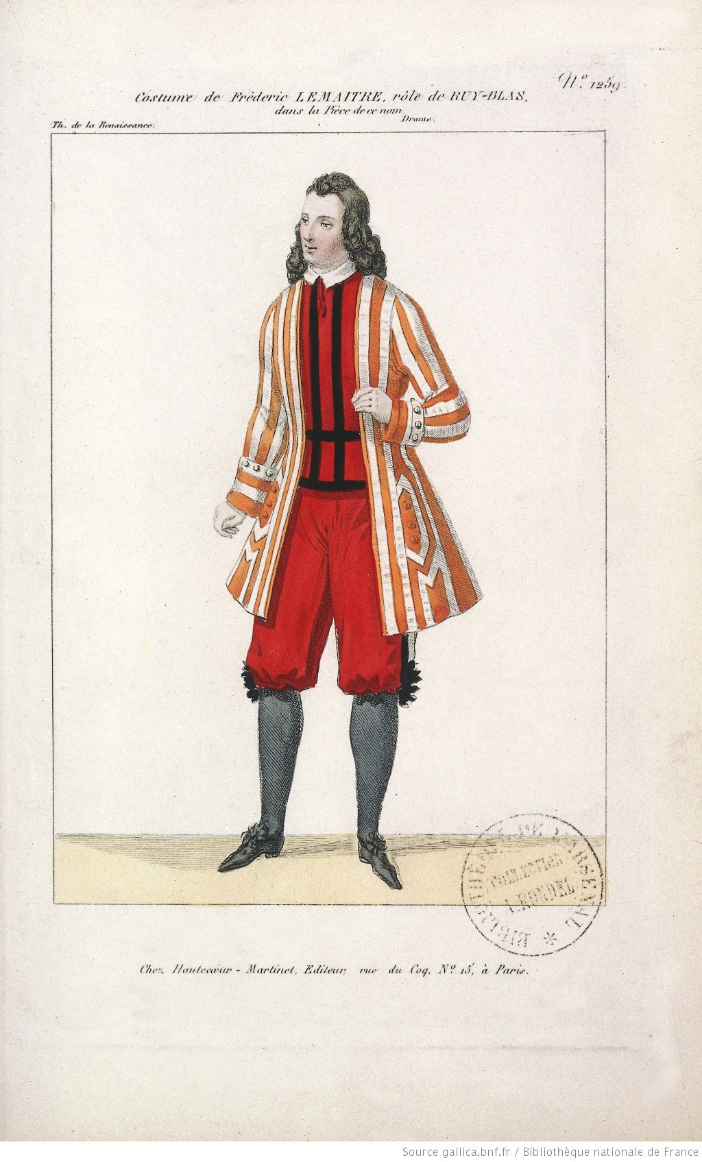 Titre : [Ruy Blas : lot d'estampes] Éditeur : Fréderic Lemaitre (Paris) Date d'édition : 1838 Format : Rec. factice ; 23 x 14,5 cm Identifiant : ark:/12148/btv1b64000012